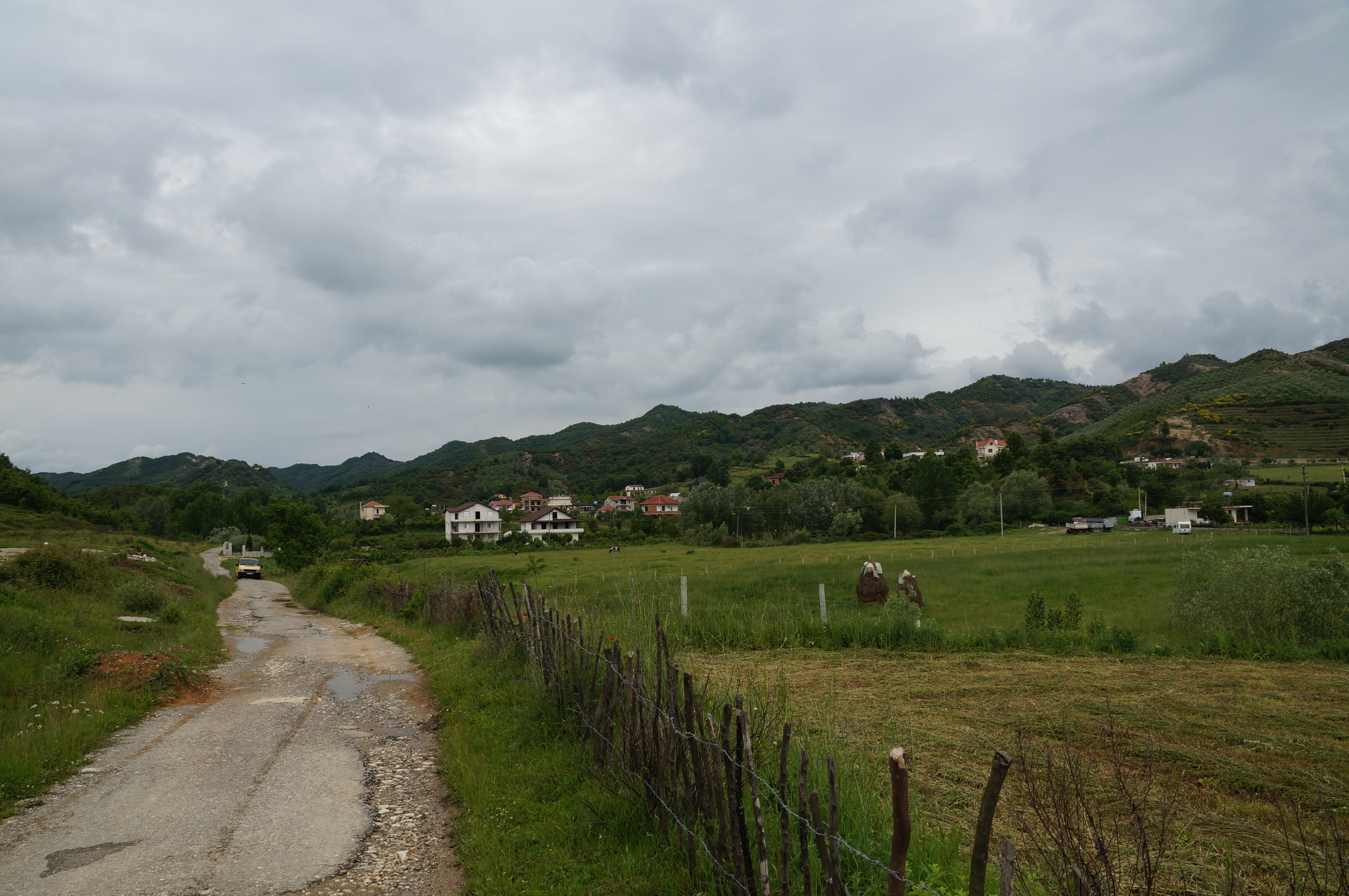 Gërdec village in Vora commune, Albania